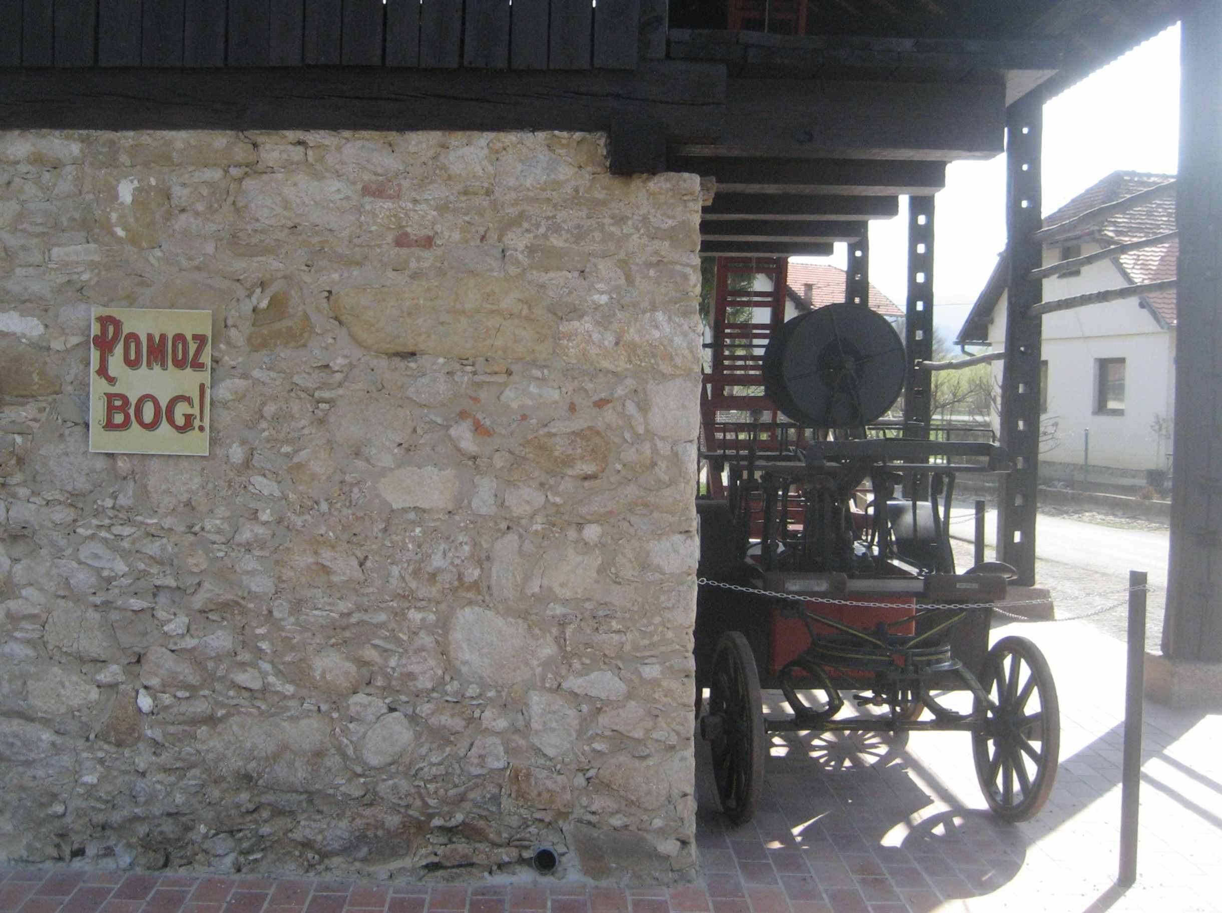 Pomoz Bog, Hrvatski pozdrav